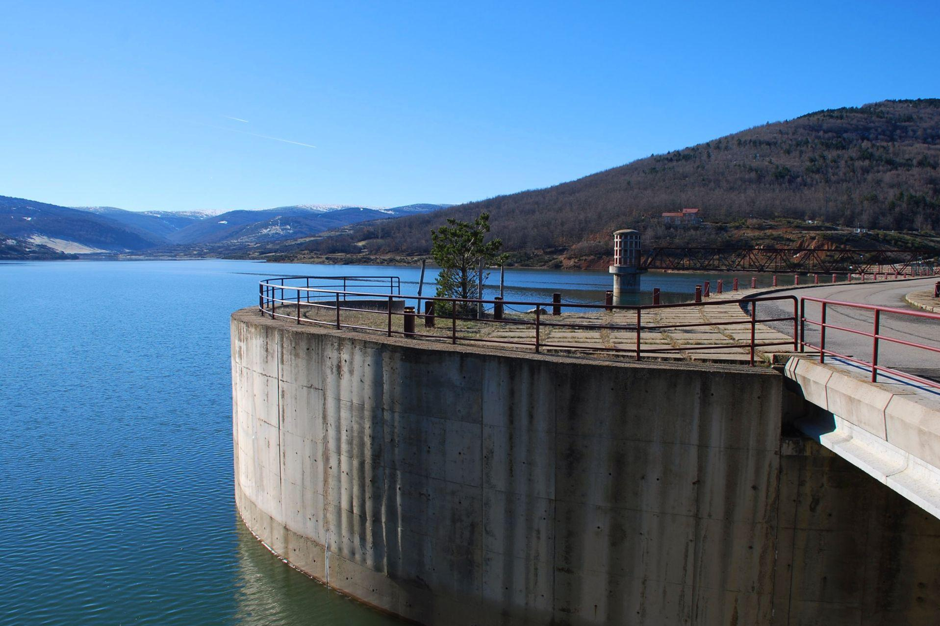 Presa del embalse de Pajares (La Rioja).